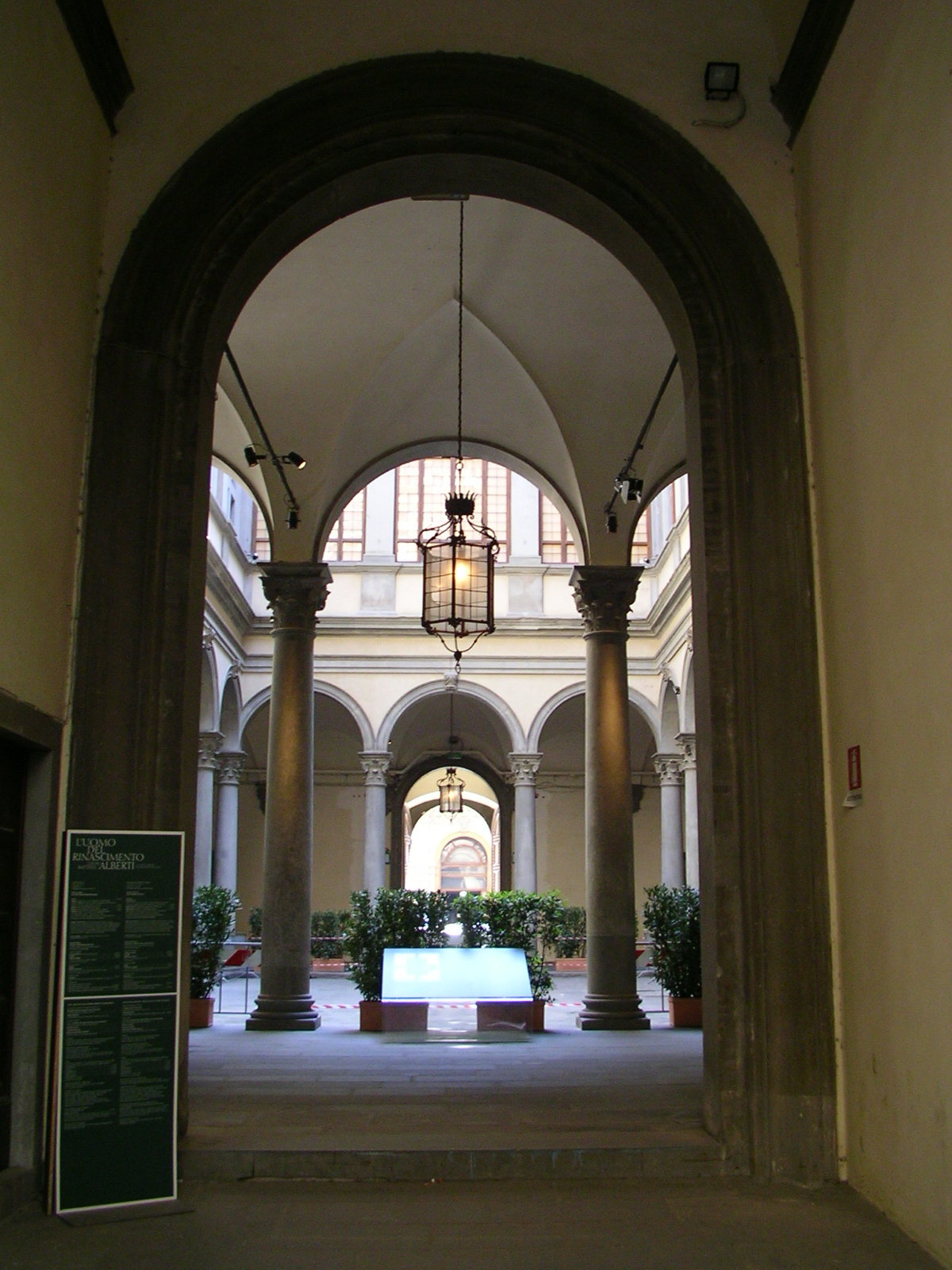 Entrance to Palazzo Strozzi courtyard in Florence, Italy